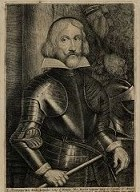 Historique : Cette estampe fait partie de la série de grands albums reliés contenant des portraits gravés et provenant du cabinet de gravures constitué par Louis-Philippe, duc d'Orléans puis roi des Français. La constitution des albums s'est étendue pendant plus de vingt-cinq ans et était conservée au Palais-Royal. Sur les 114 volumes dont on garde la trace, 75 sont aujourd'hui conservés à Versailles dont 65 seulement contiennent des gravures - près de 16 500. Les albums furent ensuite conservés au manoir d'Anjou, près de Bruxelles, dans la collection d'Henri d'Orléans comte de Paris, puis, lorsqu'en 1948 le prince et sa famille quittèrent la Belgique pour se fixer au Portugal, les volumes furent mis en vente publique à Bruxelles. A la demande de Charles Mauricheau-Beaupré, le comte de Paris accepta de retirer les volumes et les vendit au château de Versailles pour 1 200 000 Francs. Cf. Delalex Hélène, " La collection de portraits gravés de Louis-Philippe au château de Versailles ", Revue des Musées de France - Revue du Louvre, 2009.